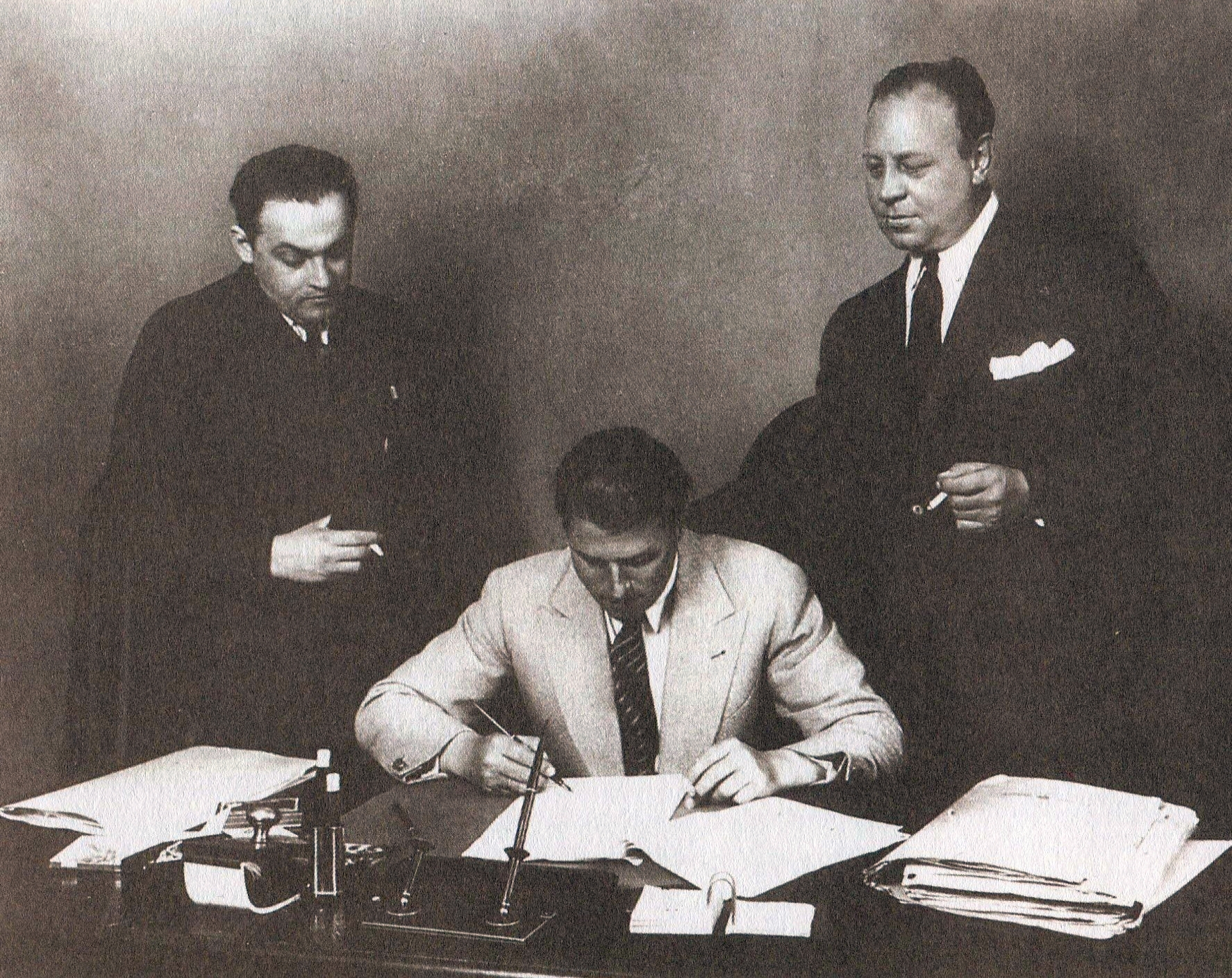 UFA-Produktionsleiter Erich Pommer mit Carl Zuckmayer (Mitte) und Emil Jannings